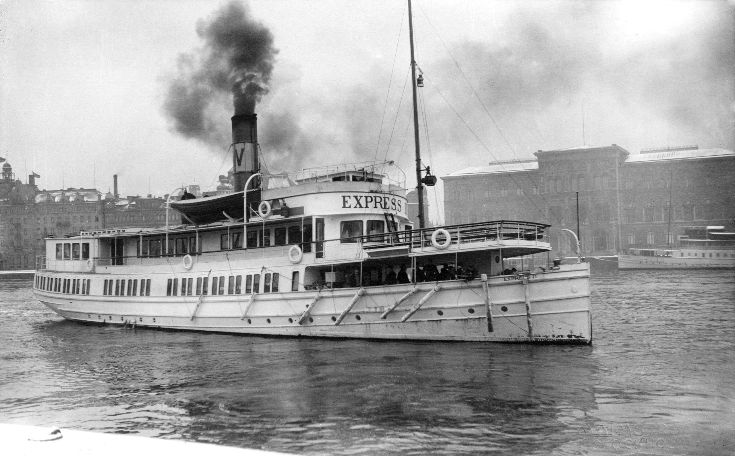 Waxholmsbolagets S/S Express II på strömmen i Stockholm